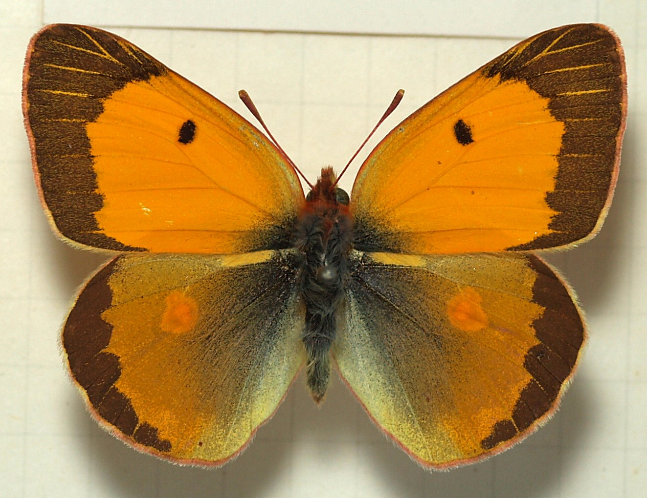 Colias croceus